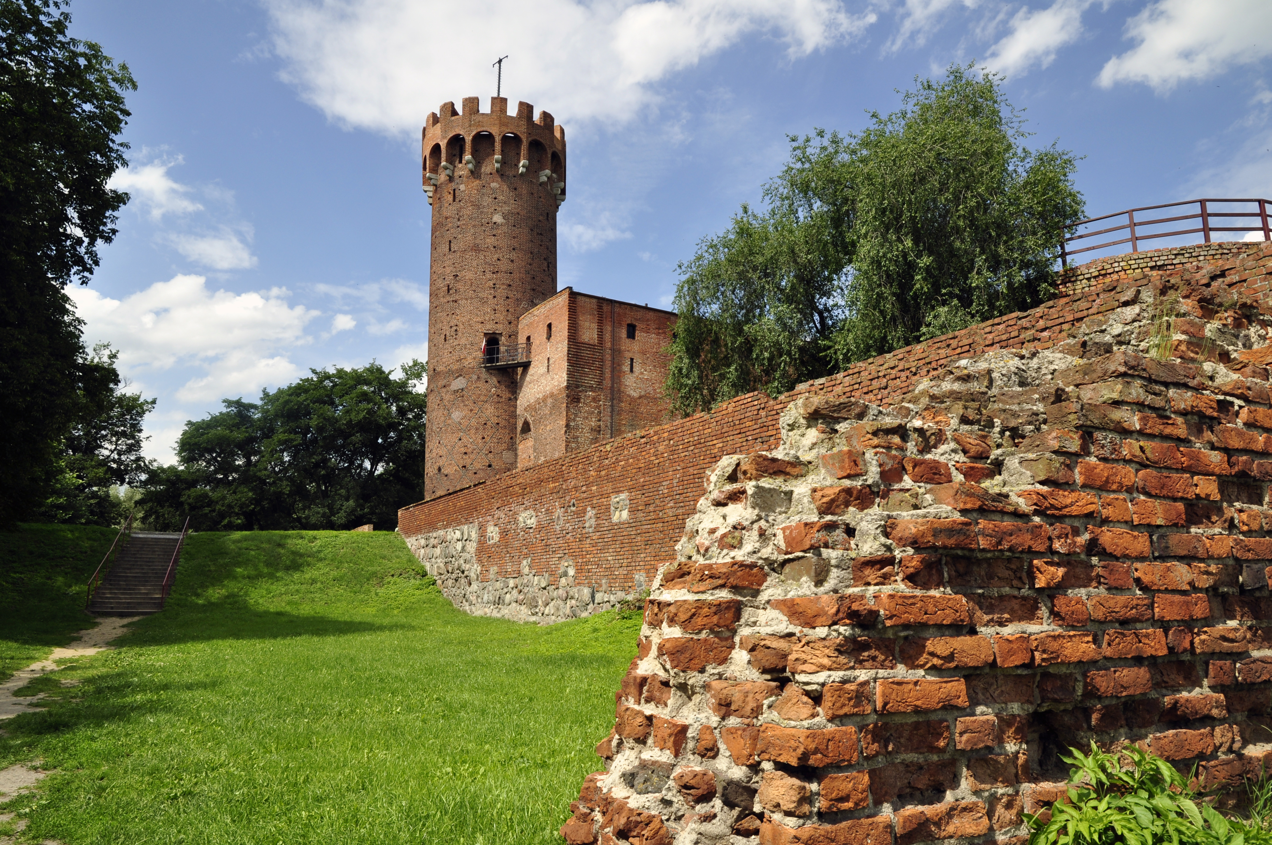 ruiny zamku krzyżackiego, 2 ćw. XIV, 2 poł. XV w., Świecie